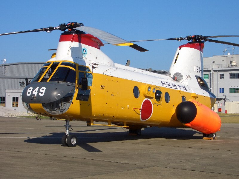 展示されるKV-107IIA-5